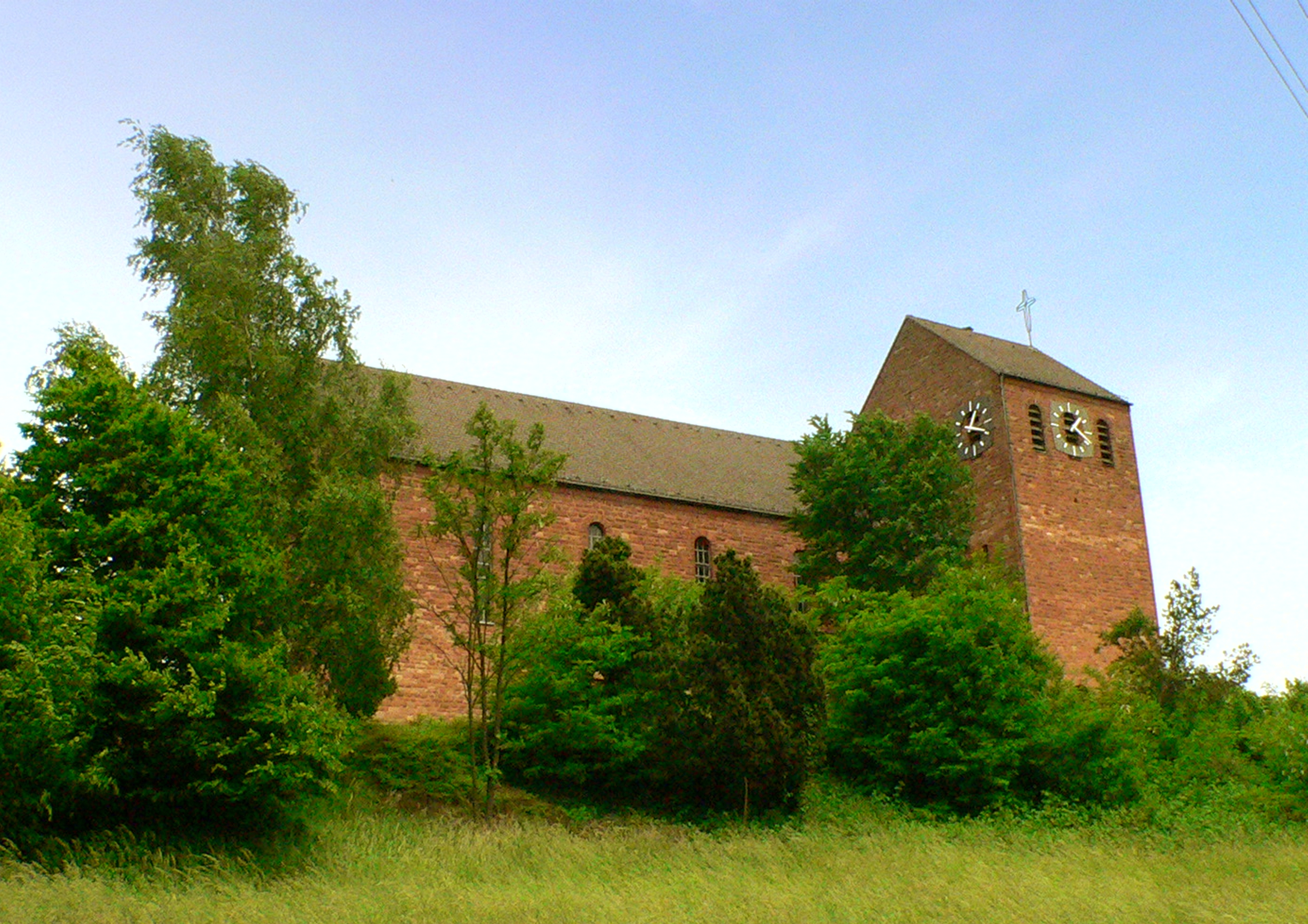 Kirche in Sommerkahl bei Aschaffenburg, Deutschland